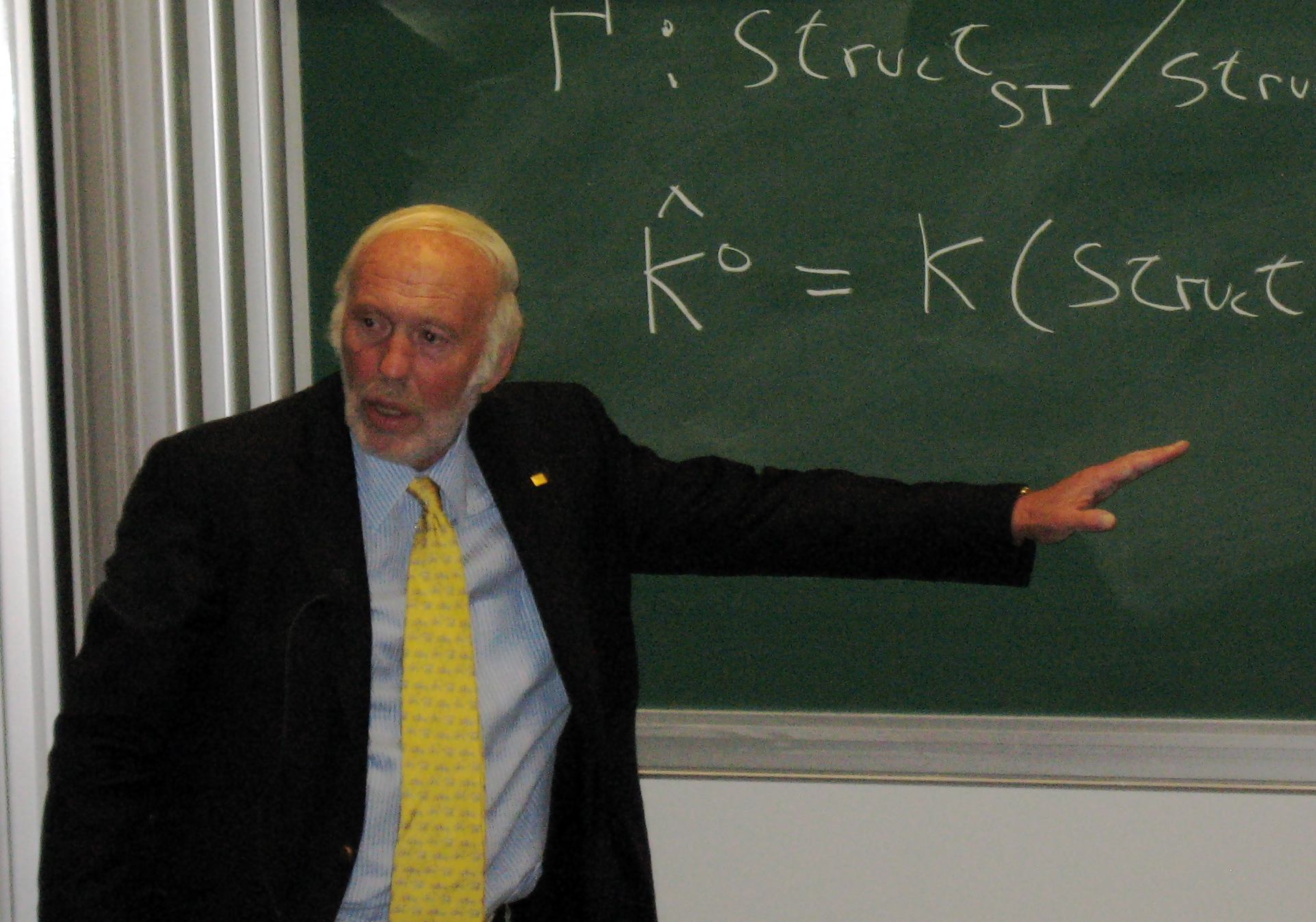 Den amerikanske matematiker James Harris Simons.